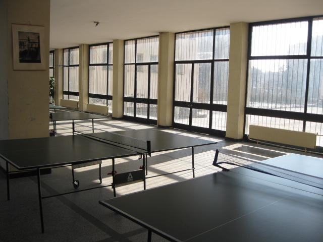 Оборудването за тенис на маса